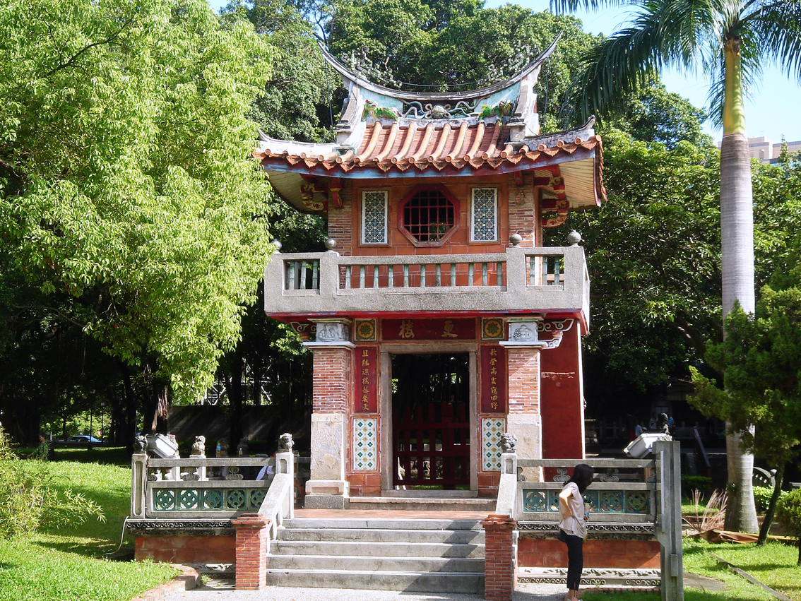 台中吳鸞旂公館更樓。